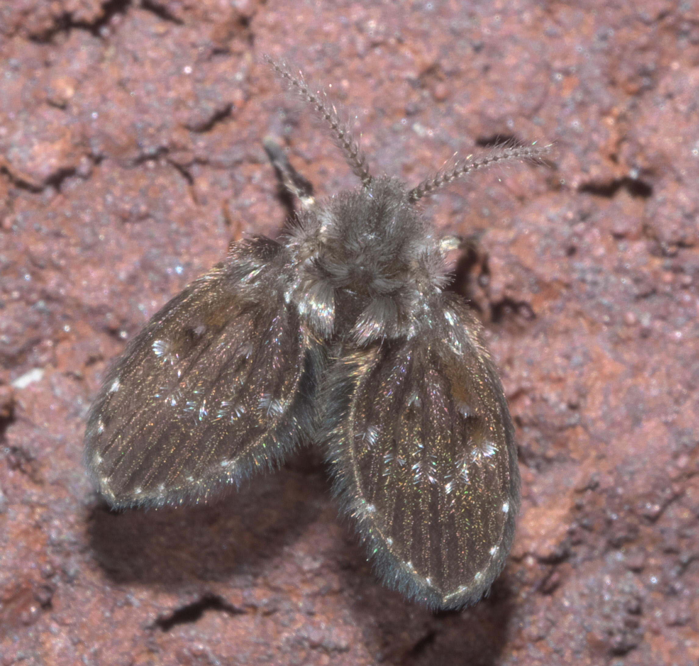 Clogmia albipunctata, filter fly, Size: 5.1 mm, ID Confidence: 88